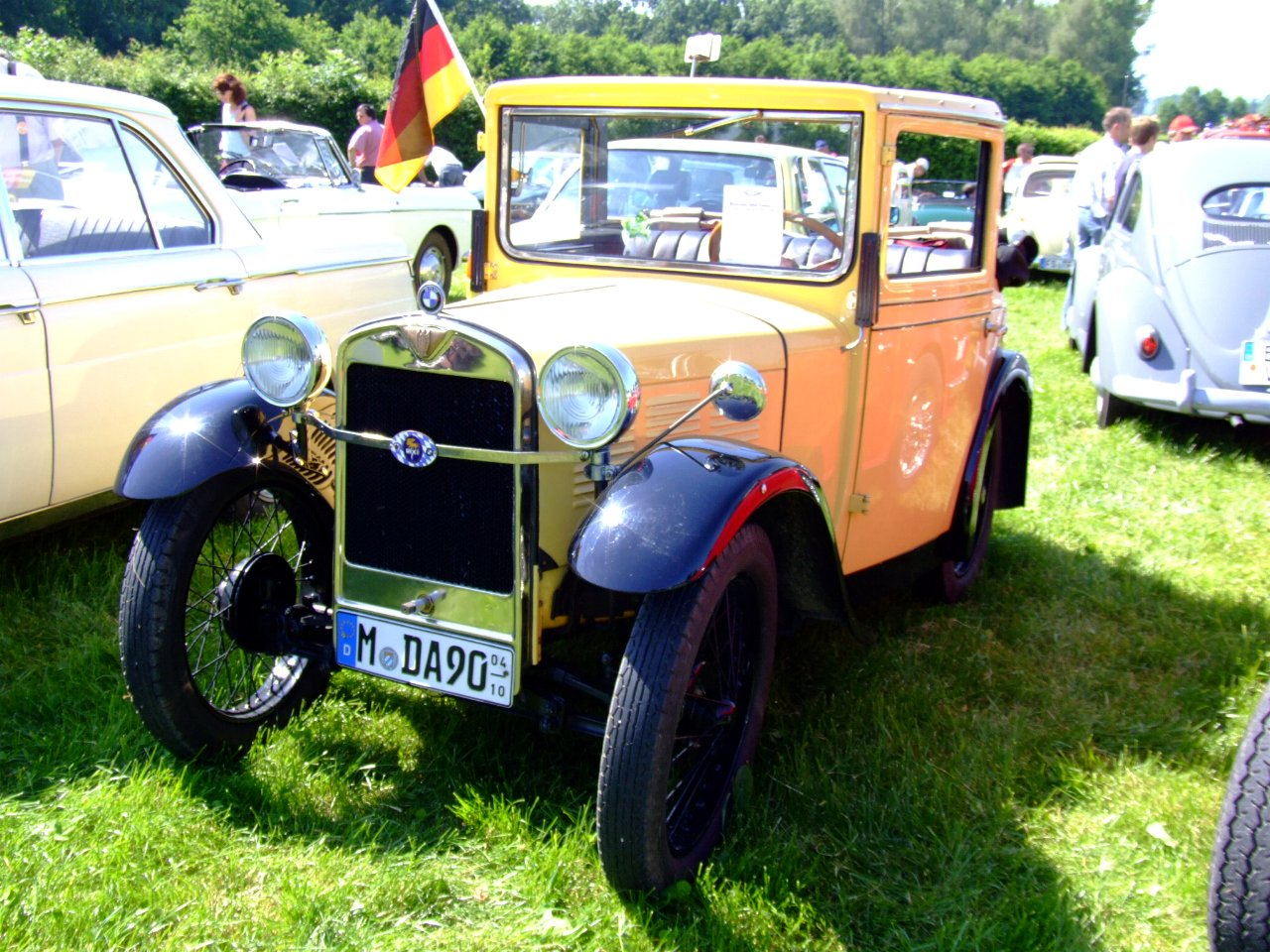 BMW Dixi Baujahr: 1930 15 PS